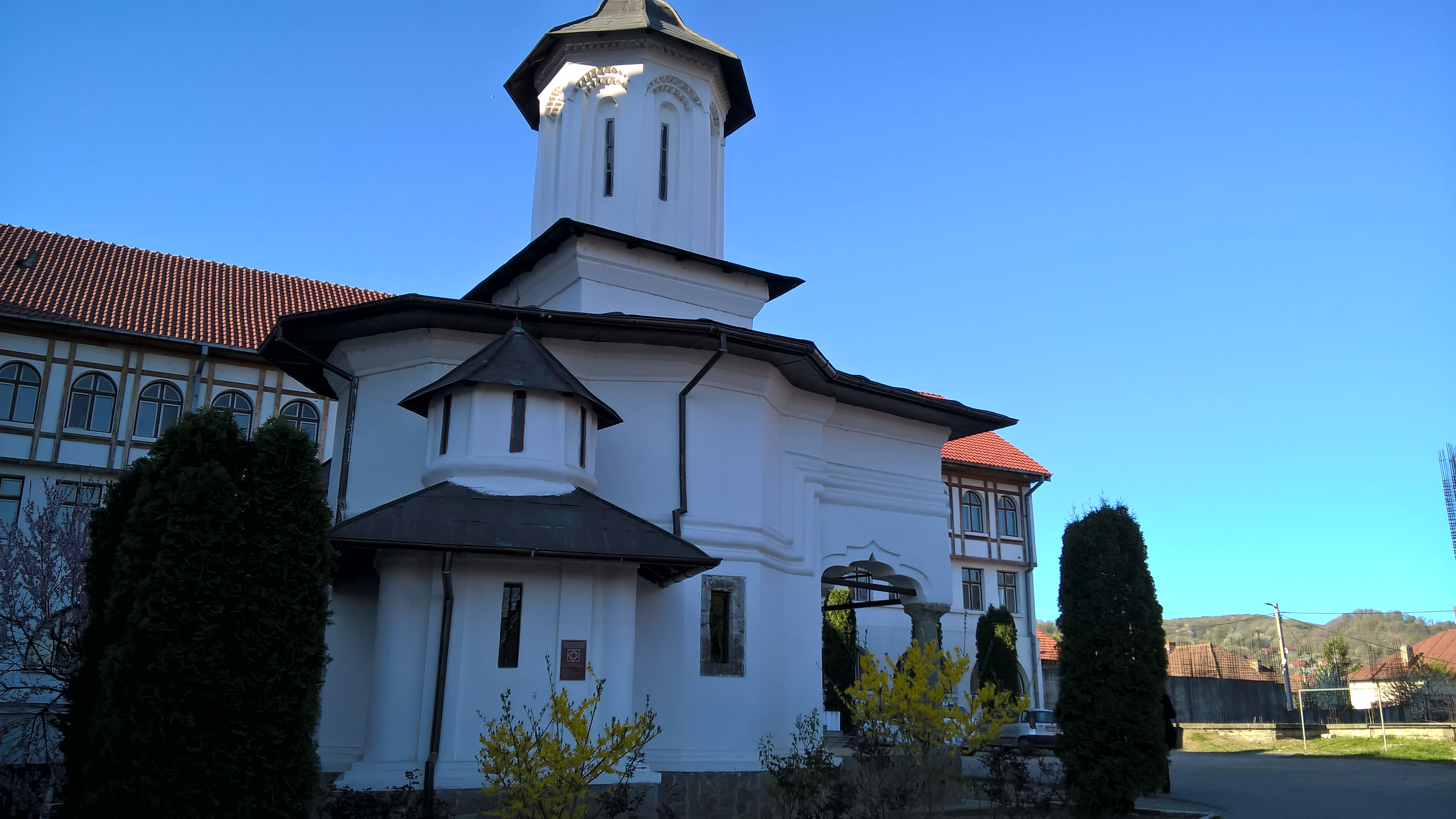 Biserica „Buna Vestire” a fostului Schit Inătești, municipiul Râmnicu Vâlcea Str. Antim Ivireanu 17 01